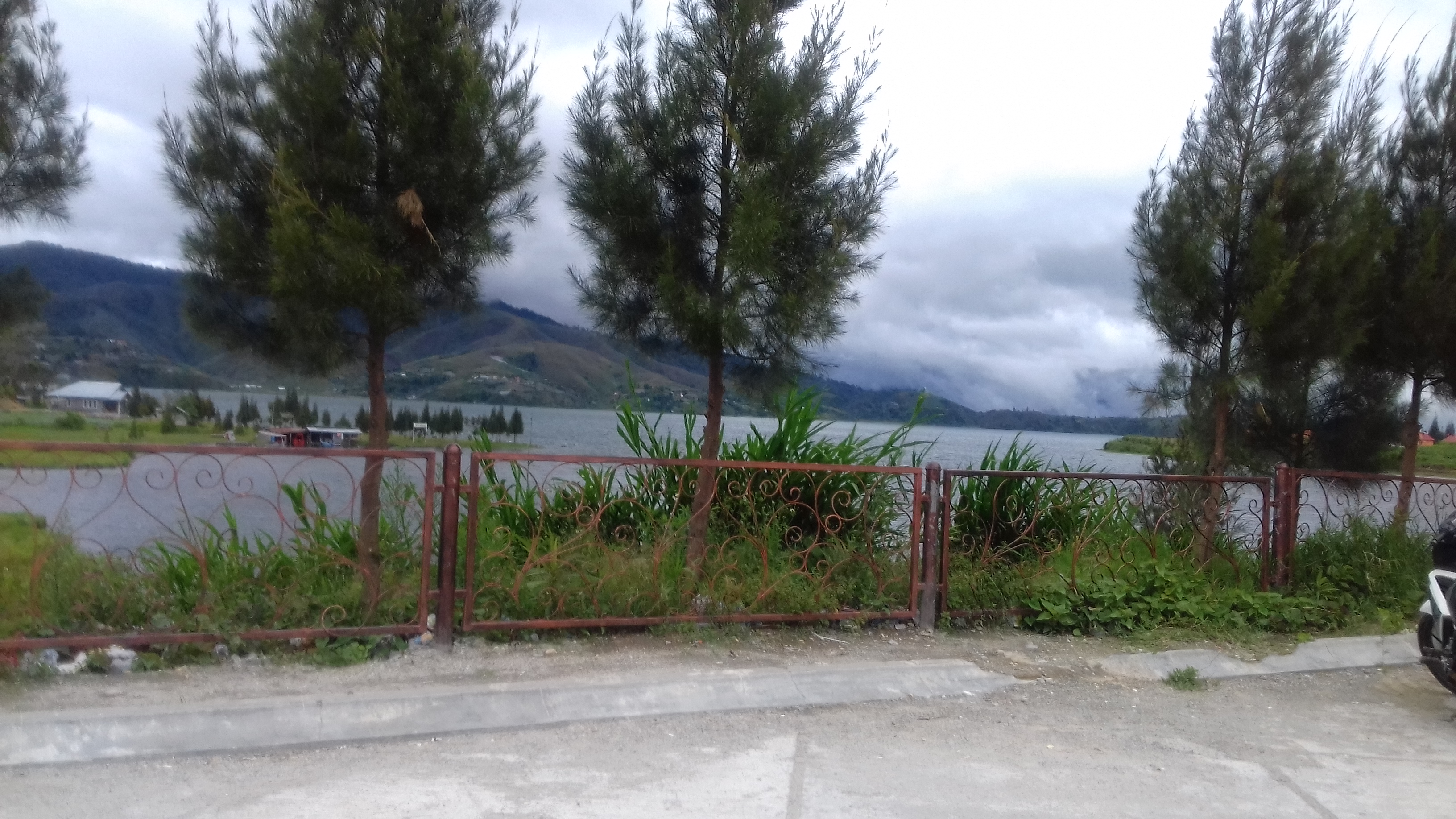 Kesejukan alam di Danau Di Atas Kabupaten Solok